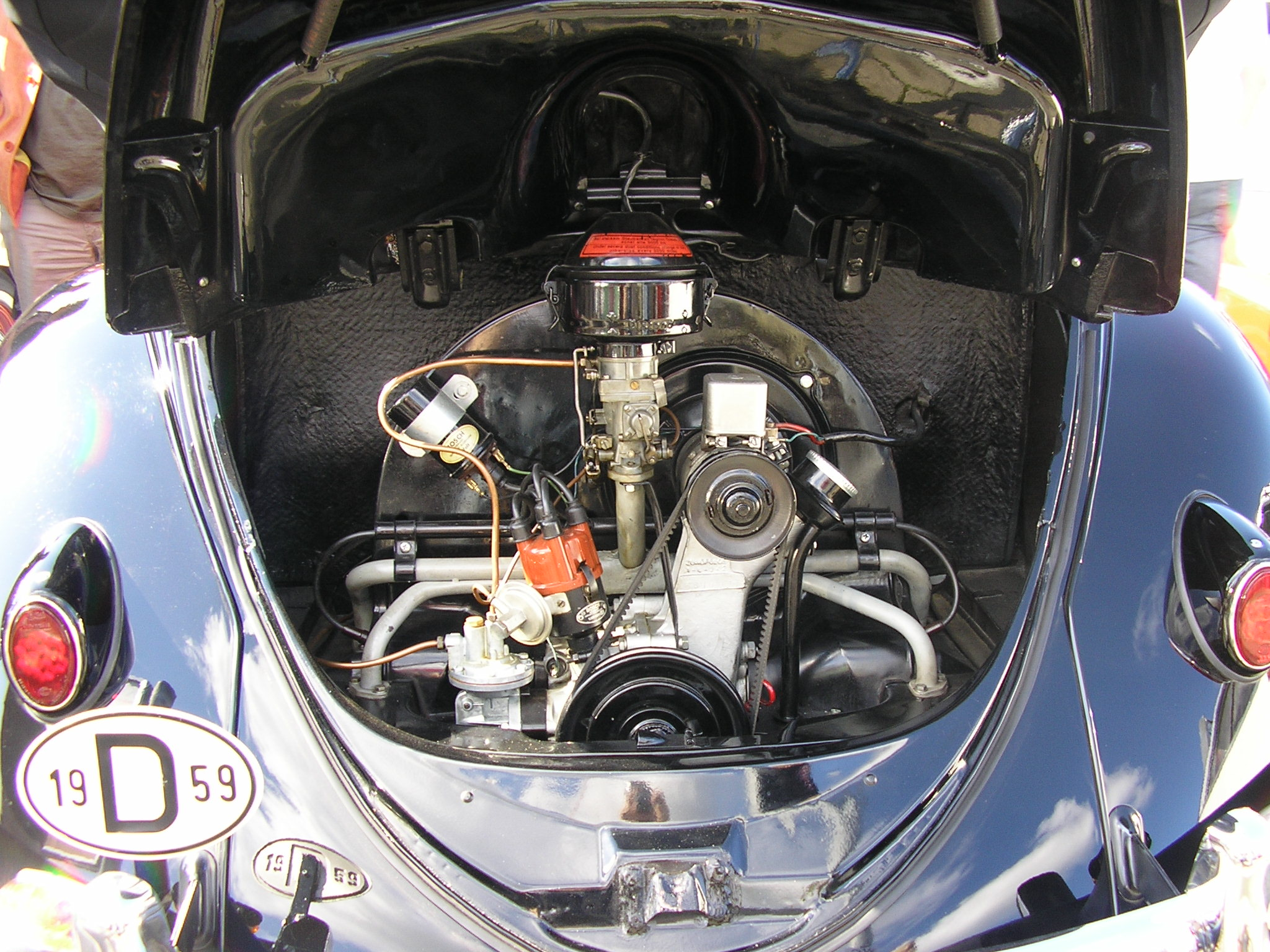 VW-Käfer Motor 30PS von 1959